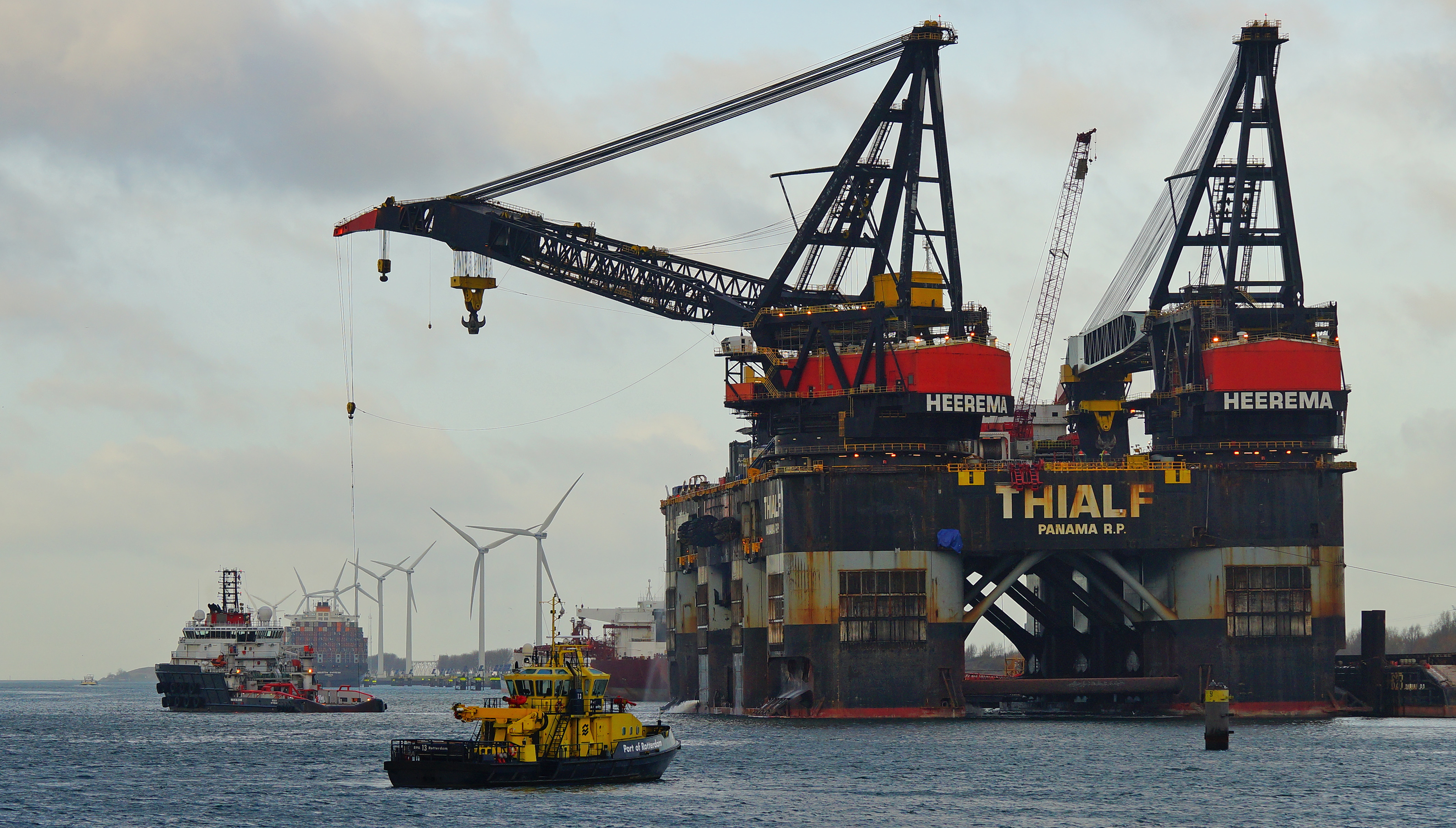 Calandkanaal Europoort 11-12-2016